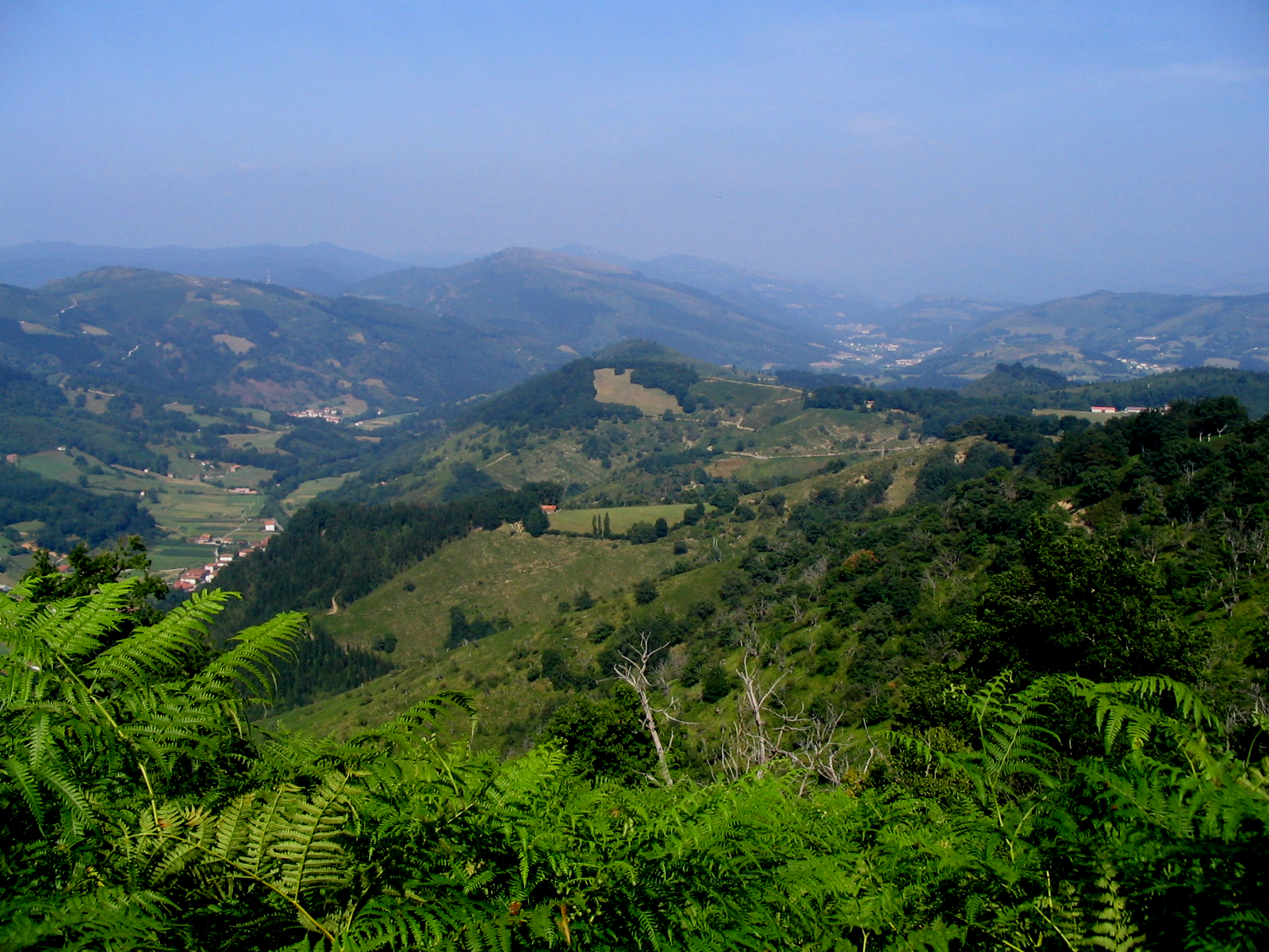 Borde sur la colline d'Amestia à Ituren (Navarre (Pyrénées).